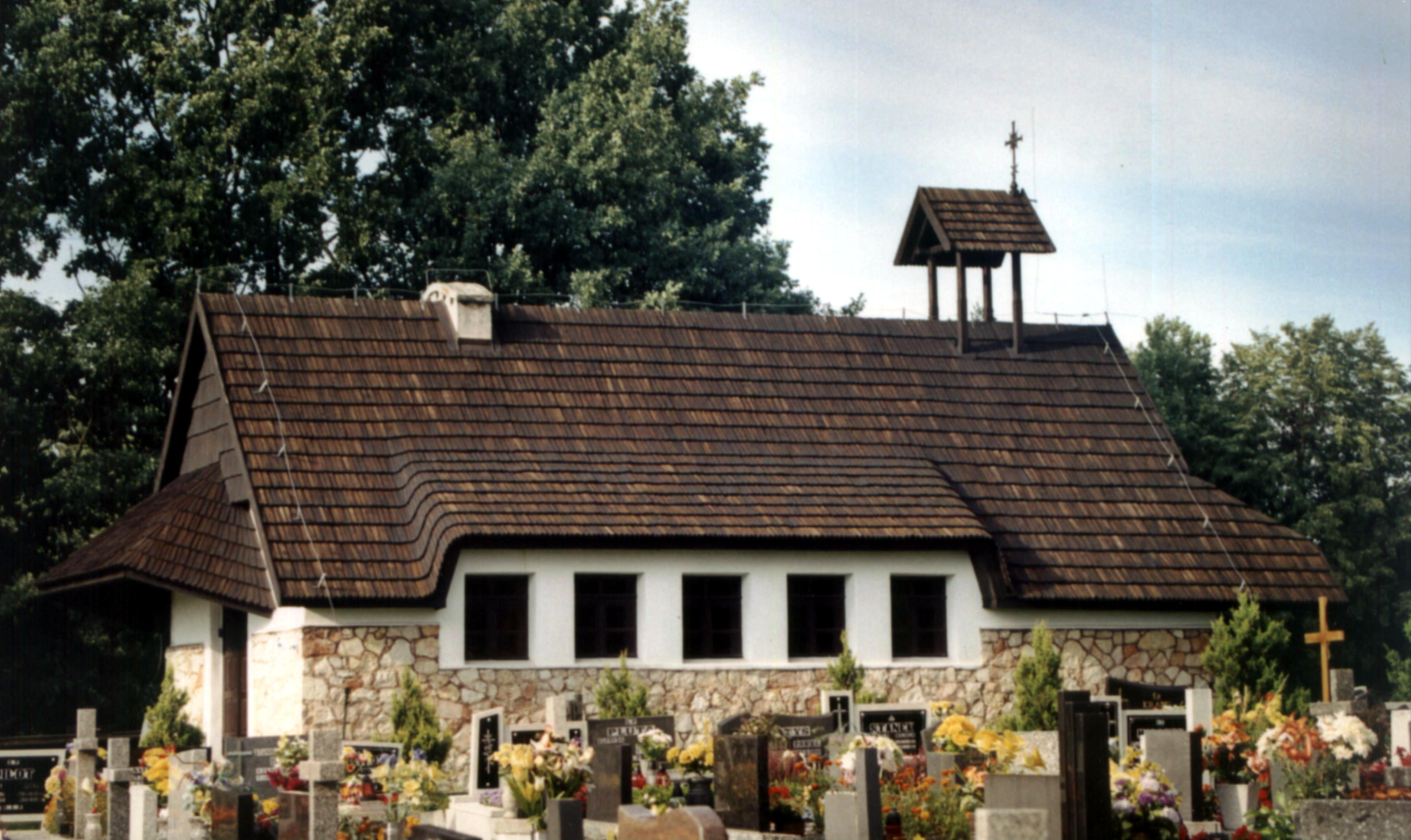 Kościół parafialny pod wezwaniem NMP Królowej Różańca Świętego w Boronowie, powiat lubliniecki, województwo śląskie - kaplica przedpogrzebowa